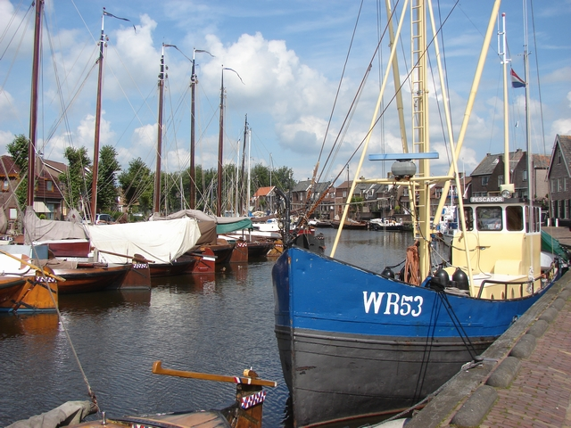 Spakenburg haven